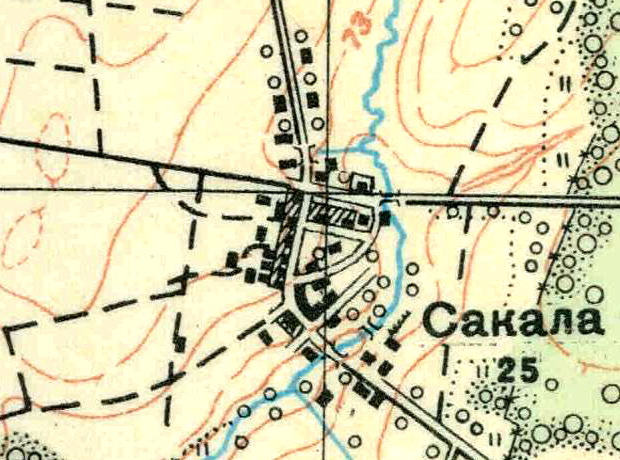 Топографическая карта Ленинградской области, квадрат О-35-22-Г-а (Керстово), деревня Саккало.